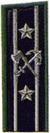 Российская империя; Министерство путей сообщения; Знаки различия петлица Коллежский асессор — гражданский чин VIII класса в Табели о рангах в России. (До 1884 года соответствовал армейскому чину майор, а после отмены майорского чина в армии соответствовал чину капитана.).